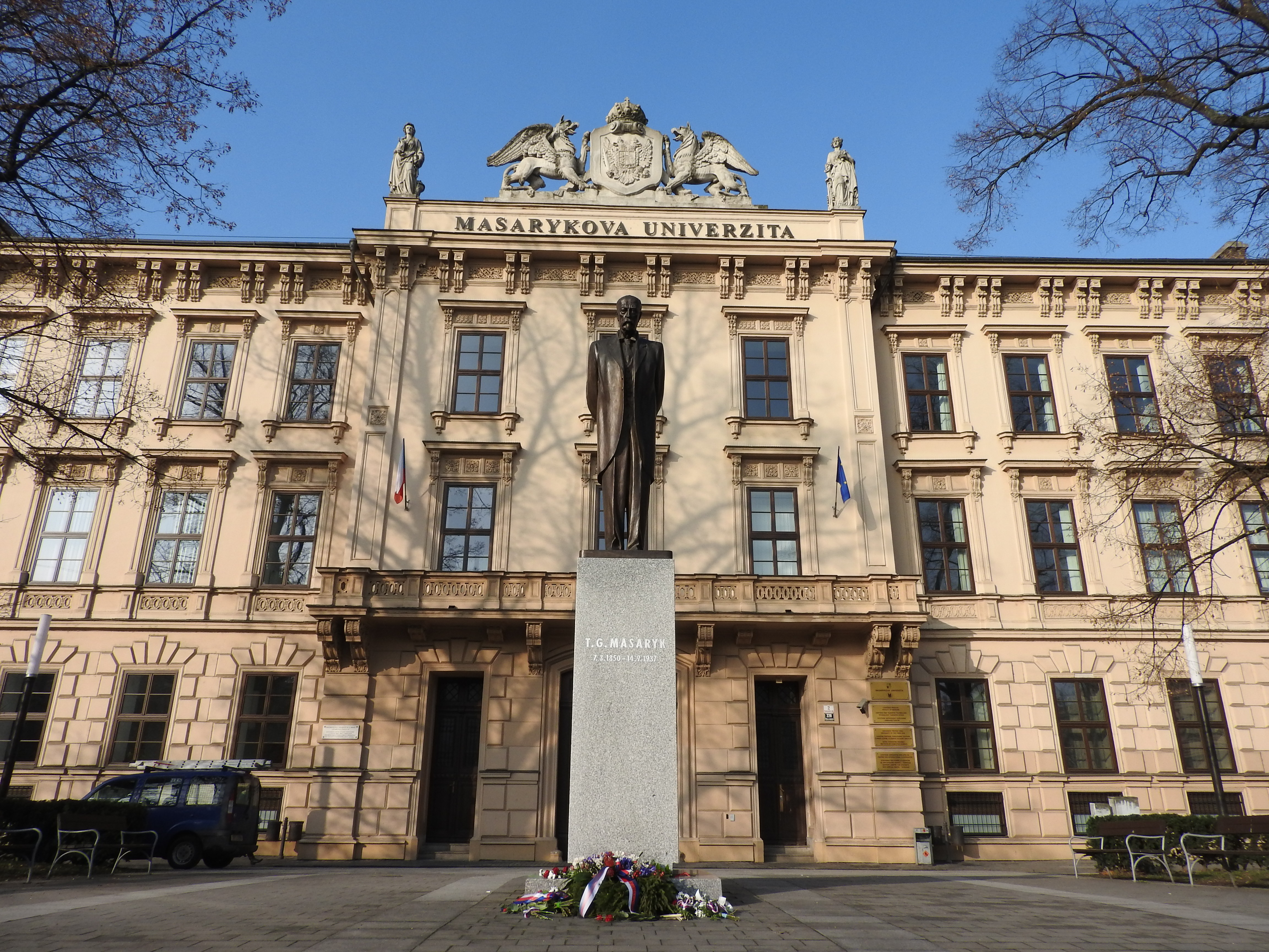 Budova Masarykovy univerzity na Komenského náměstí v Brně. V budově sídlí Lékařská fakulta, Centrum pro transfer technologií, Centrum zahraniční spolupráce, Centrum jazykového vzdělávání, Středisko pro pomoc studentům se specifickými nároky a Ústav výpočetní techniky.